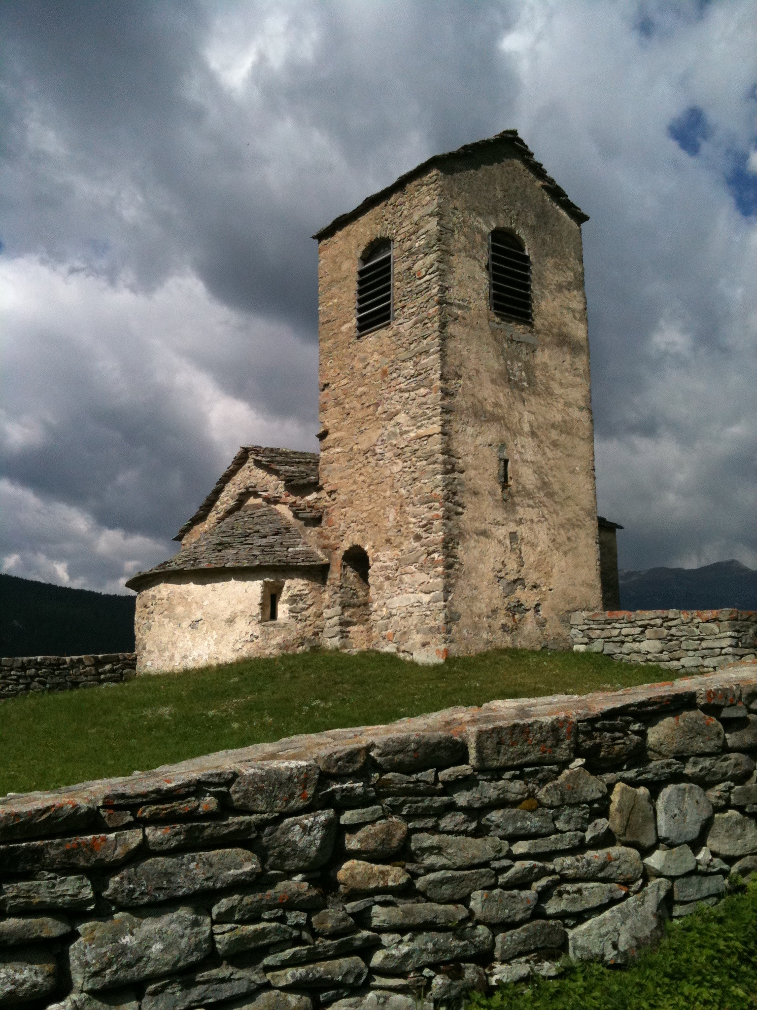 reformierte Kirche Ferrera Cresta (Kanton Graubünden, Val Ferrera)